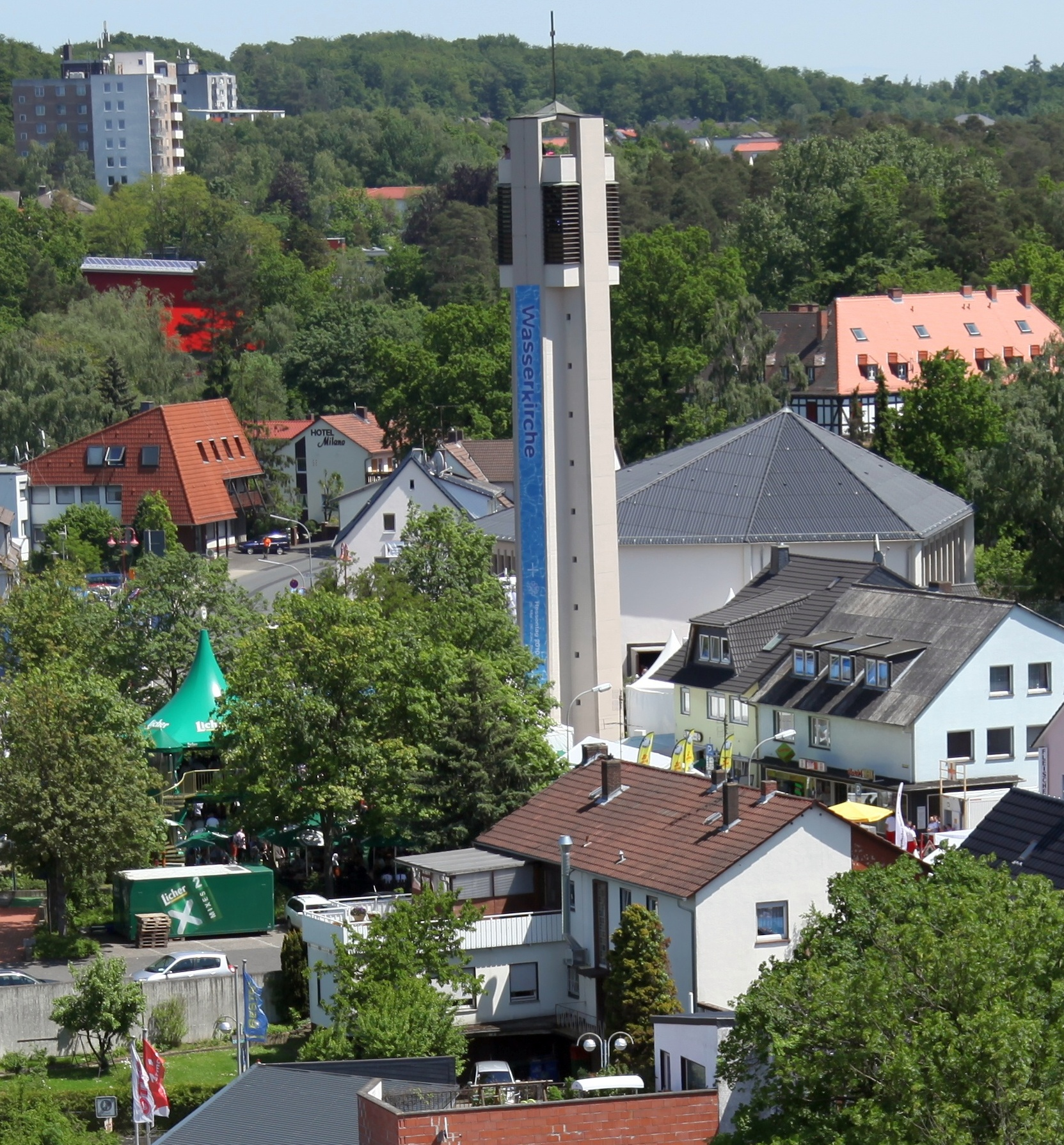 Stadtkirche Stadtallendorf während des Hessentages 2010. Rechts unten neben dem Kirchturm das eckige Kirchengebäude. Es handelt sich um ein evangelisches Gotteshaus.